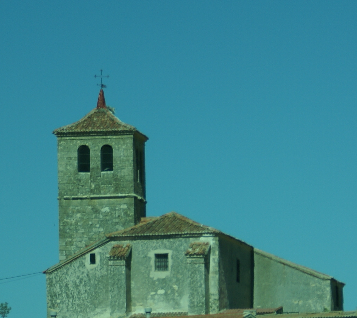 Iglesia de Roda de Eresma, Segovia